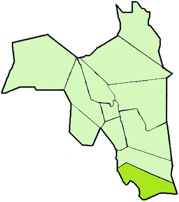 Lapinjärven kartta: Harsbölen sijainti